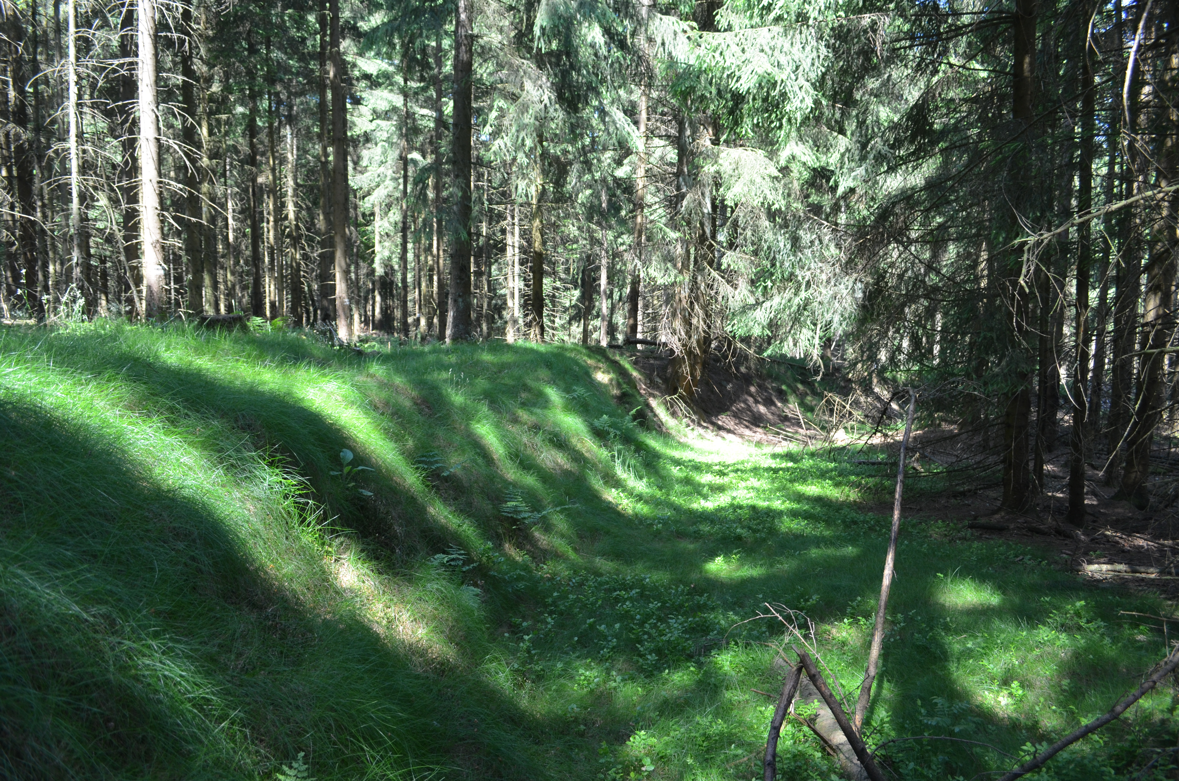 Oberreifenberg, ehemalige Naturbobbahn